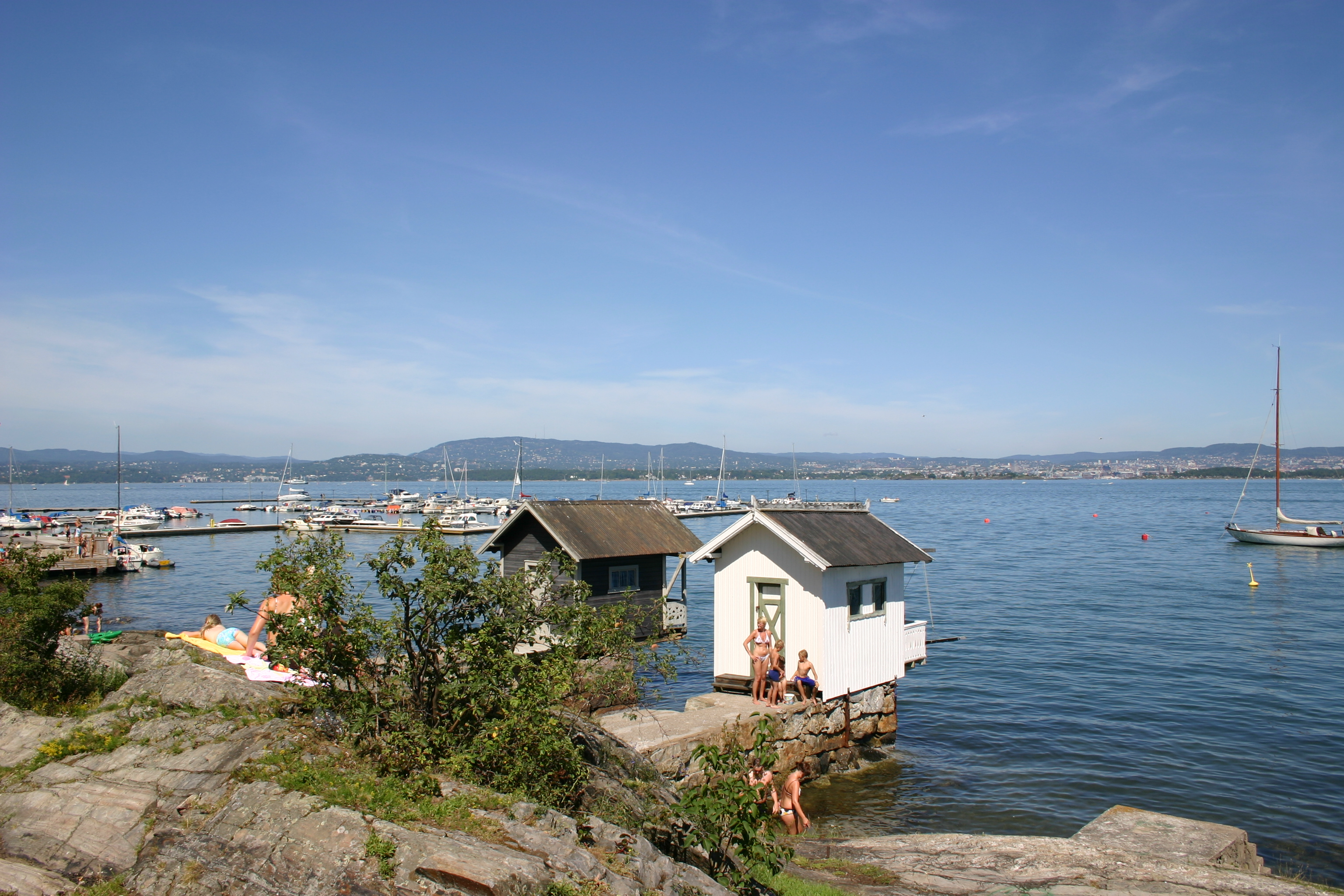 Oksval hamn og badestrand. Utsikt mot Oslo og Bunnefjorden. Nesoddbåten sjåast i fjorden.